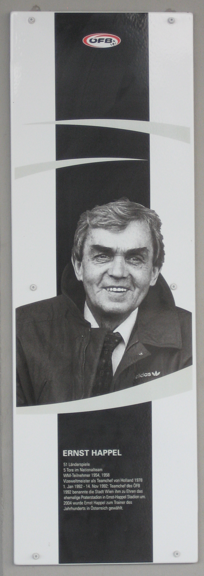 Gedenktafel für Ernst Happel montiert am Ernst-Happel-Stadion in Wien